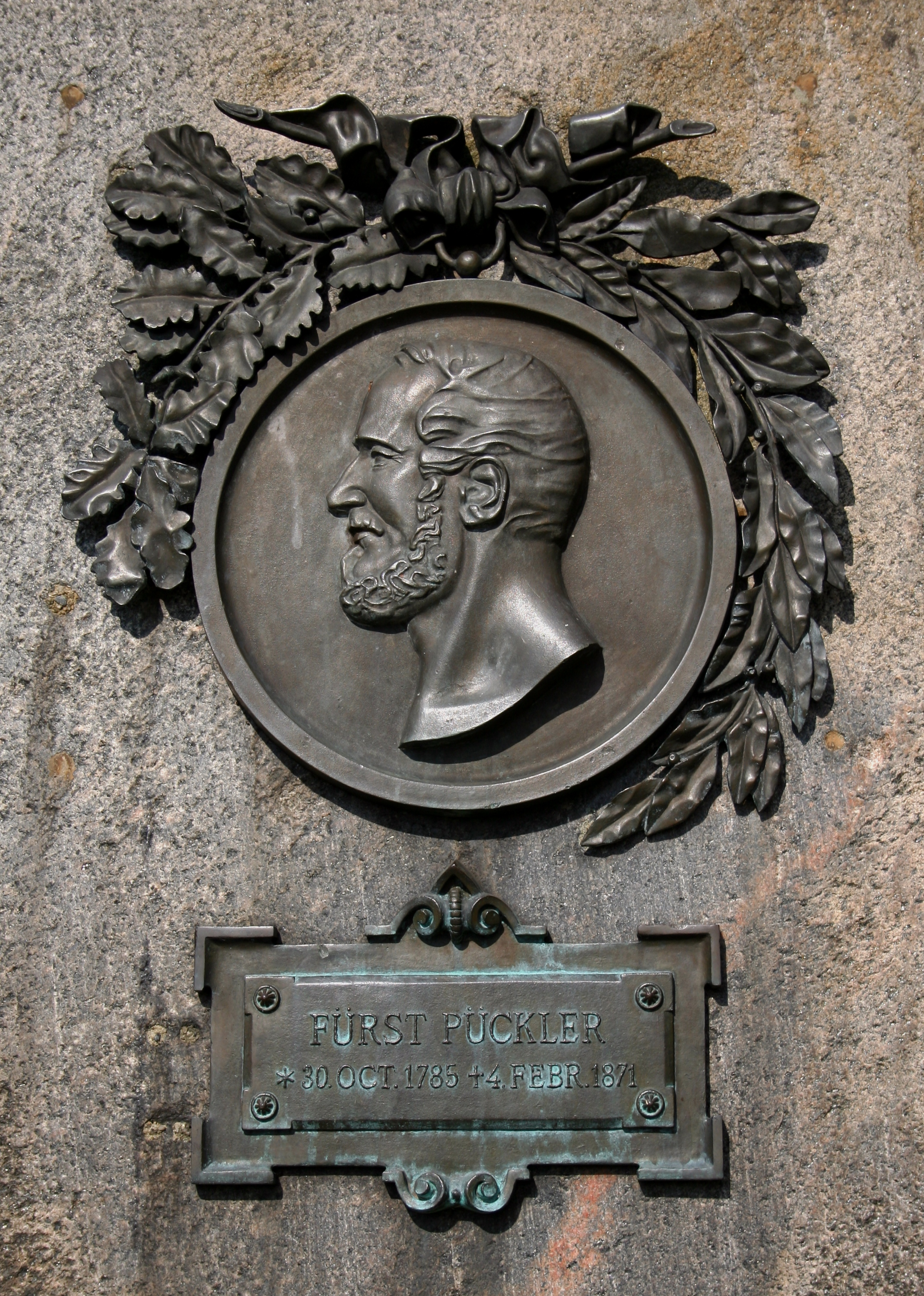 Park Mużakowski, kamień Hermanna von Pückler-Muskau